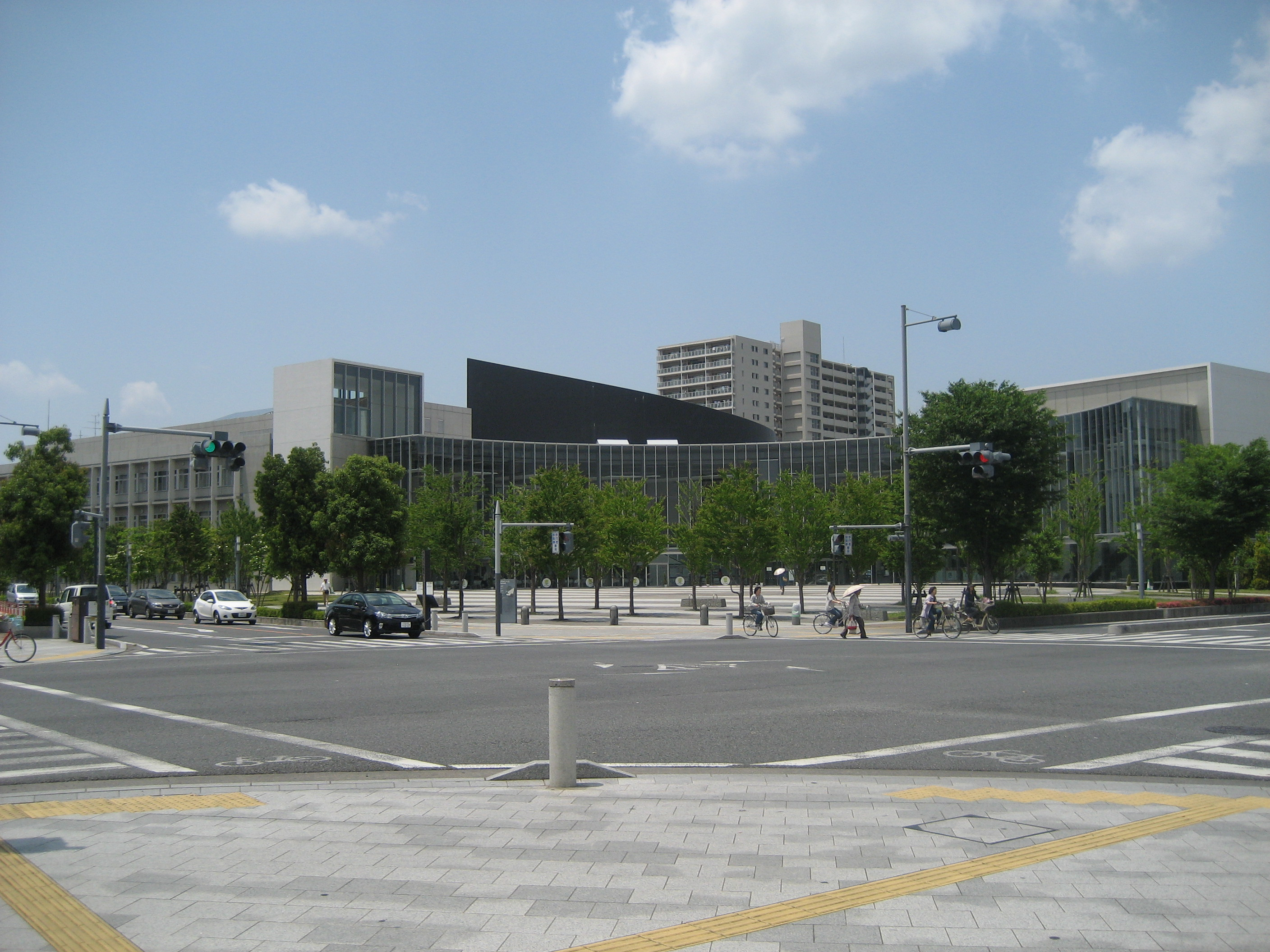 さいたま市プラザノース